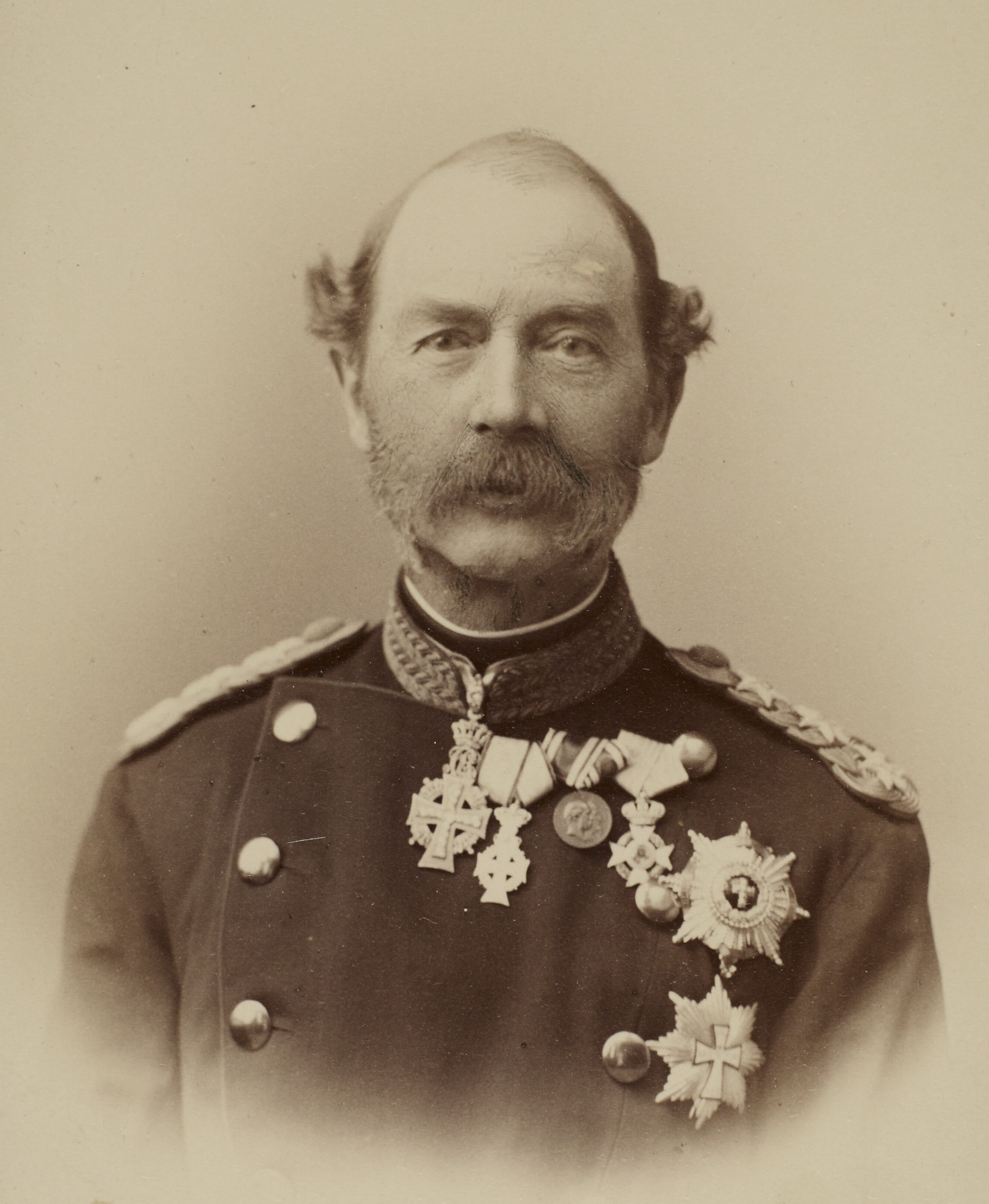 Christian IX. von Dänemark